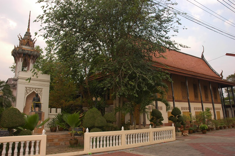 อนุเสาวรีย์เจ้าพระยาวงศาสุรศักดิ์ (แสง วงศาโรจน์) และกุฎีพระสงฆ์